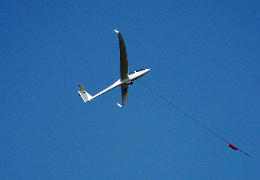 Segelflugzeug beim Windenstart auf dem Flugplatz Uetersen. This is D-6510, a DG1000S